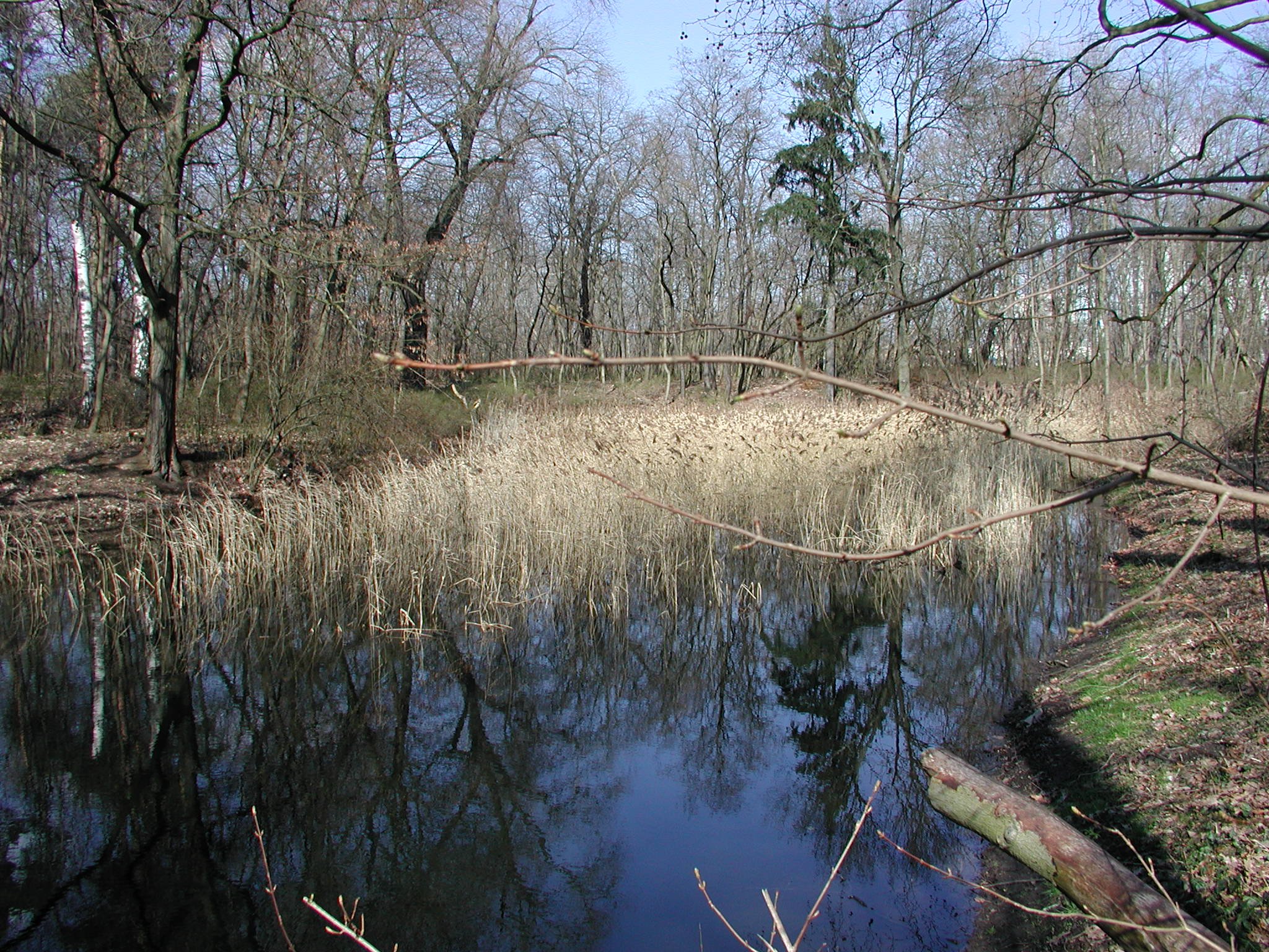 KEH, Teich (2)